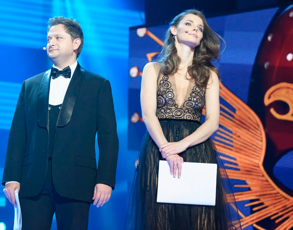 Церемония награждения премией «Золотая маска» — 2013 года.